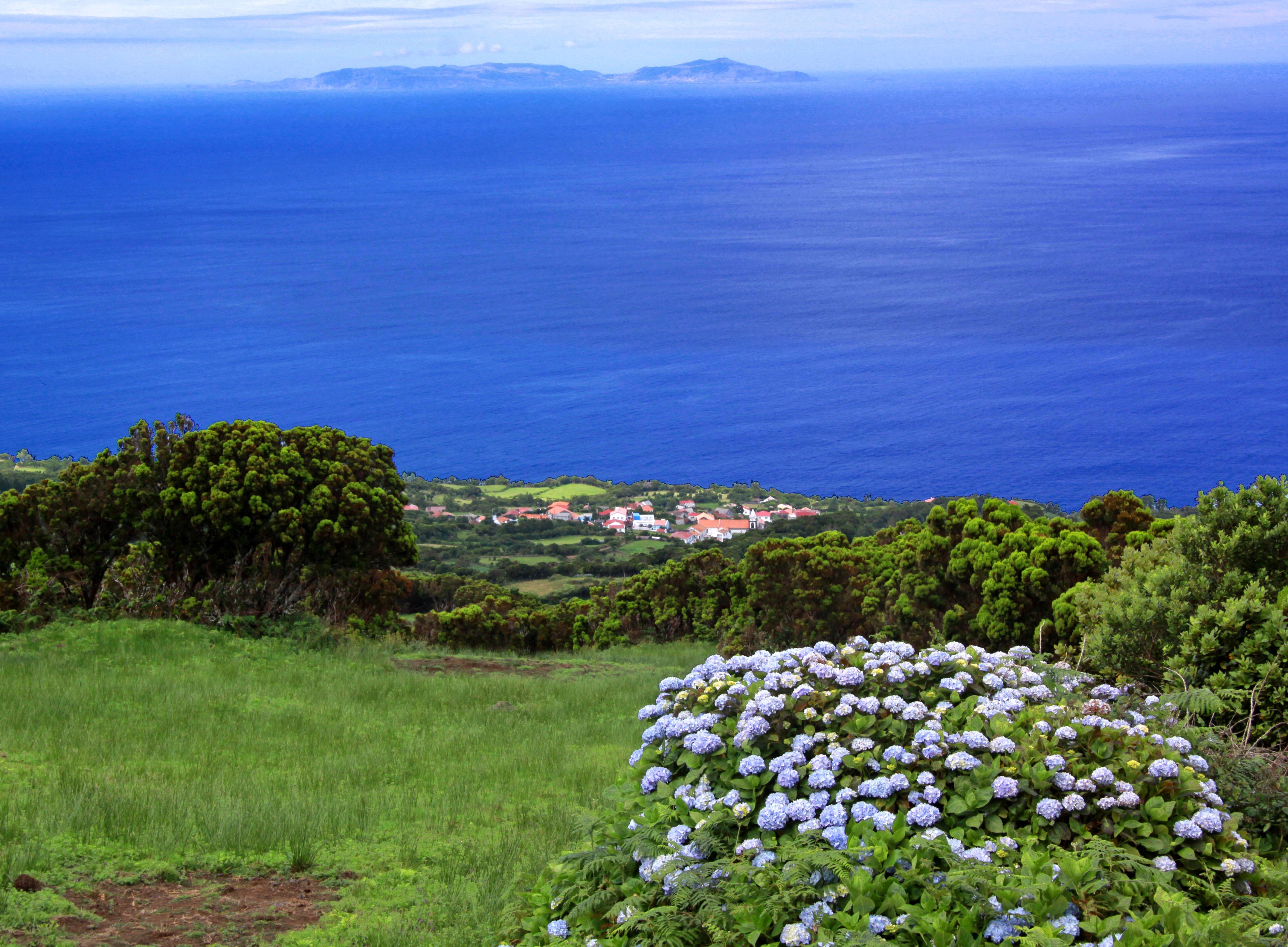 Ilha de São Jorge, Açores. Ballade dans les allées d'hortensias du côté de Norte Grande.